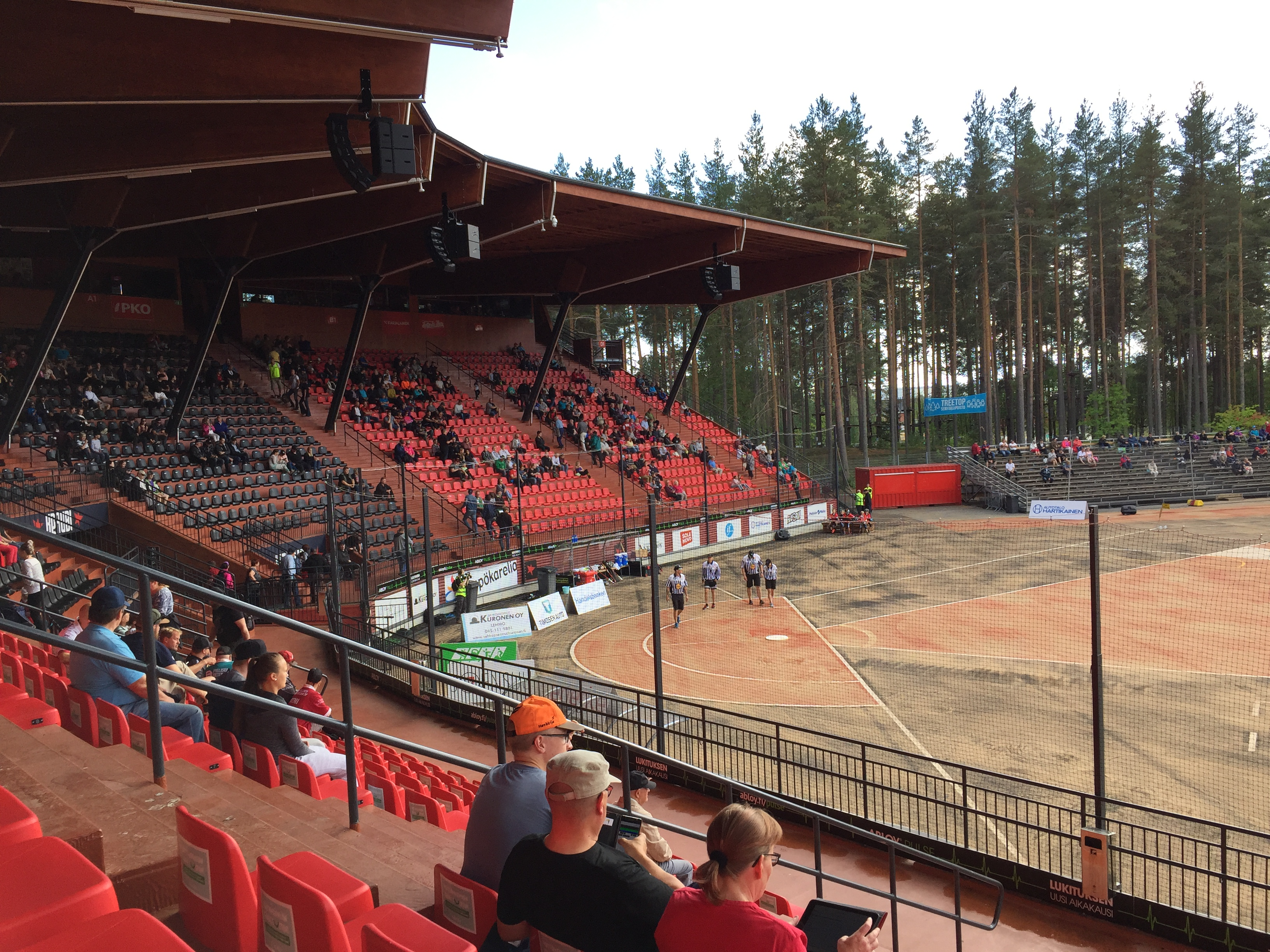 Joensuun Mehtimäellä sijaitseva 3700-paikkainen pesäpallostadion